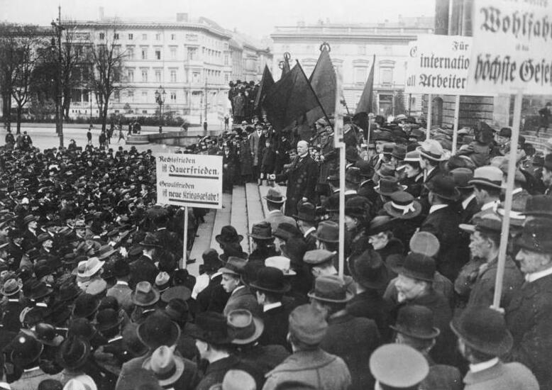 ADN-ZB/Archiv Maifeier 1919 in Berlin Reichskanzler Philipp Scheidemann spricht vor dem Reichstagsgebäude. 4335-19 [Scherl Bilderdienst]